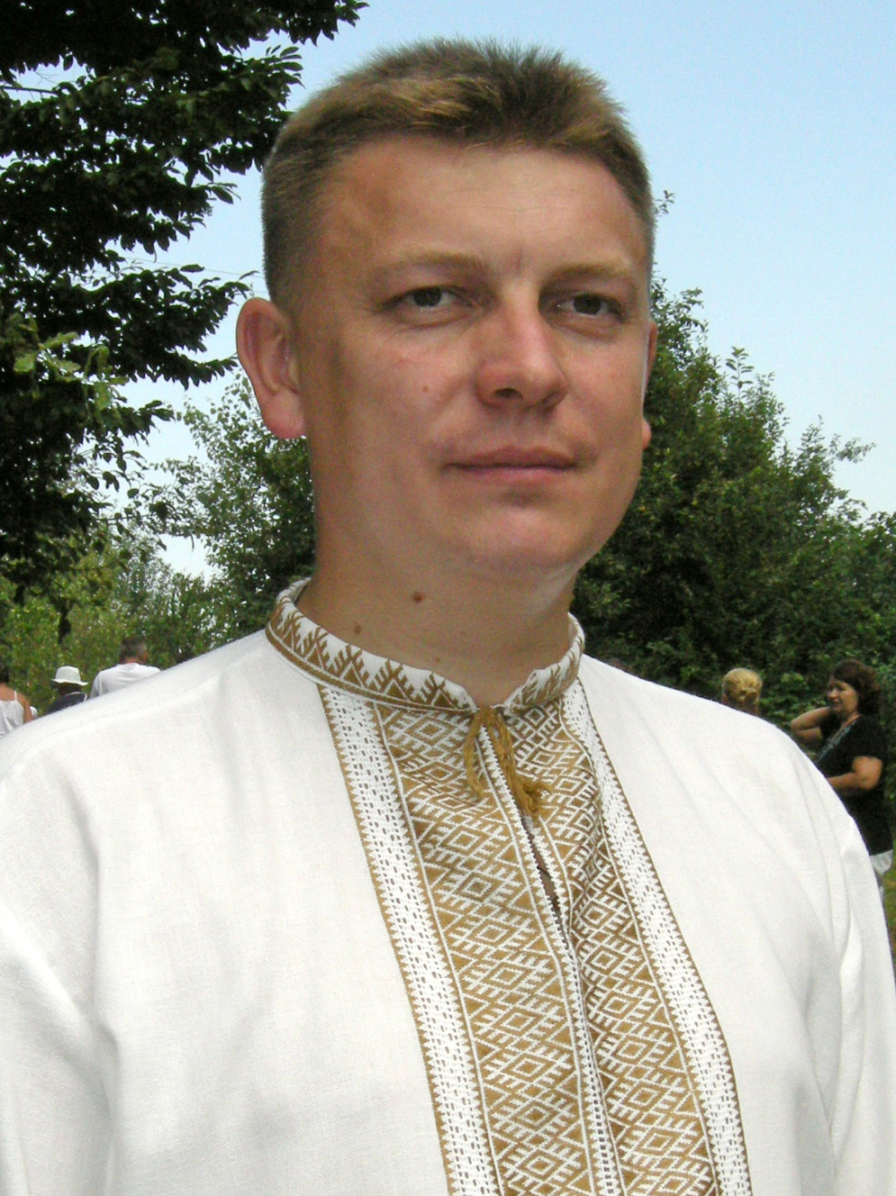 Український економіст, політик, військовик, громадський діяч, депутат Тернопільської обласної ради трьох скликань, один з координаторів громадського руху «Зарваницька ініціатива» на Тернопільщині, рядовий батальйону ПСМОП «Тернопіль» Володимир Михайлович Болєщук.